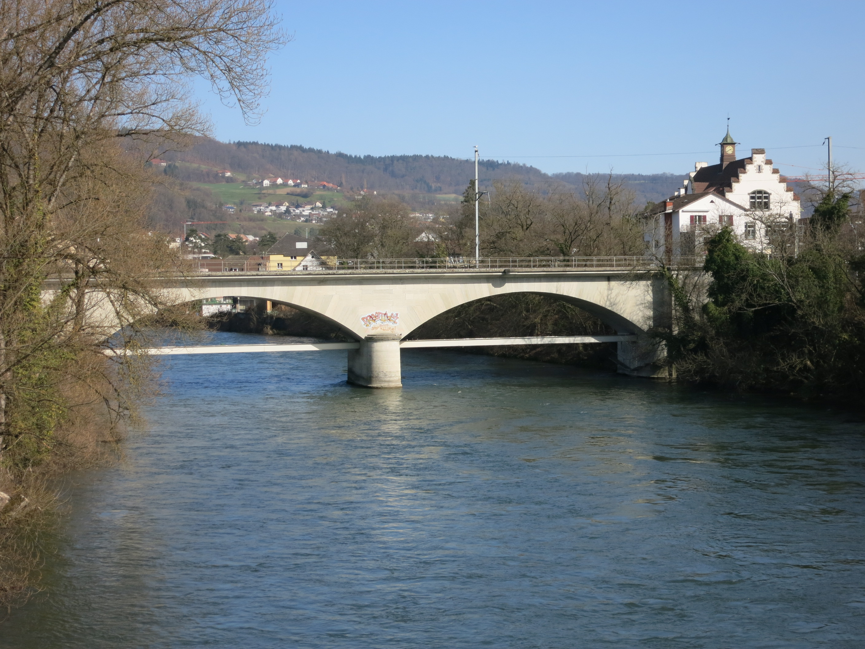 Eisenbahnbrücke Turgi-Untersiggenthal AG, Schweiz